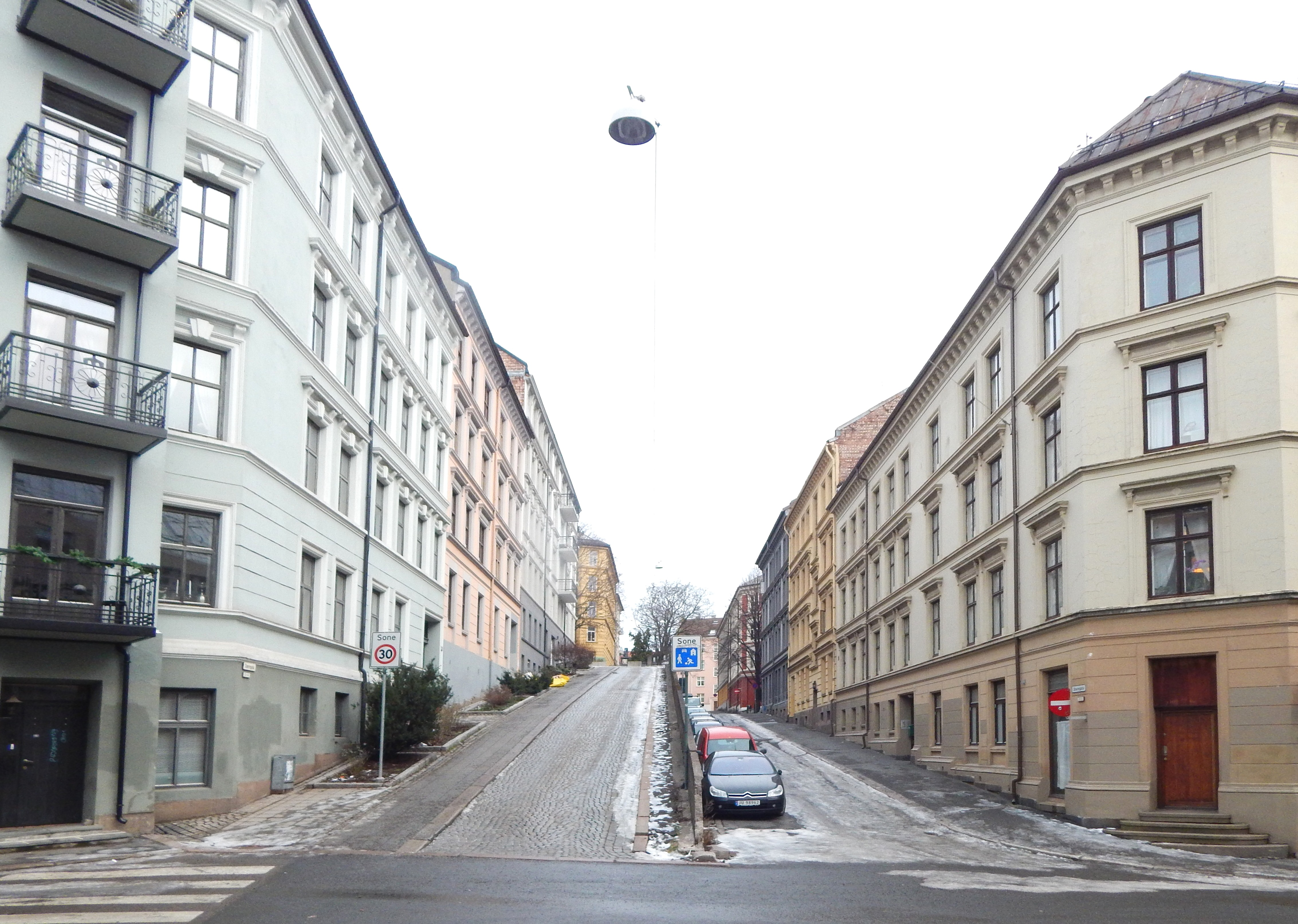 Dovregata sett fra vest